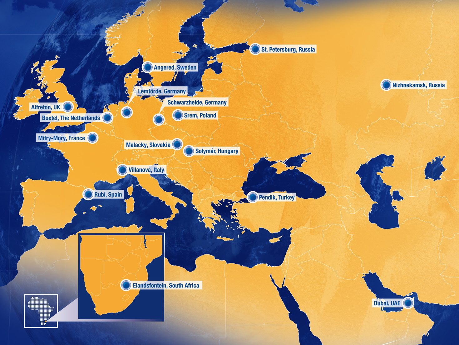 Übersicht Standorte der PU-Systemhäuser